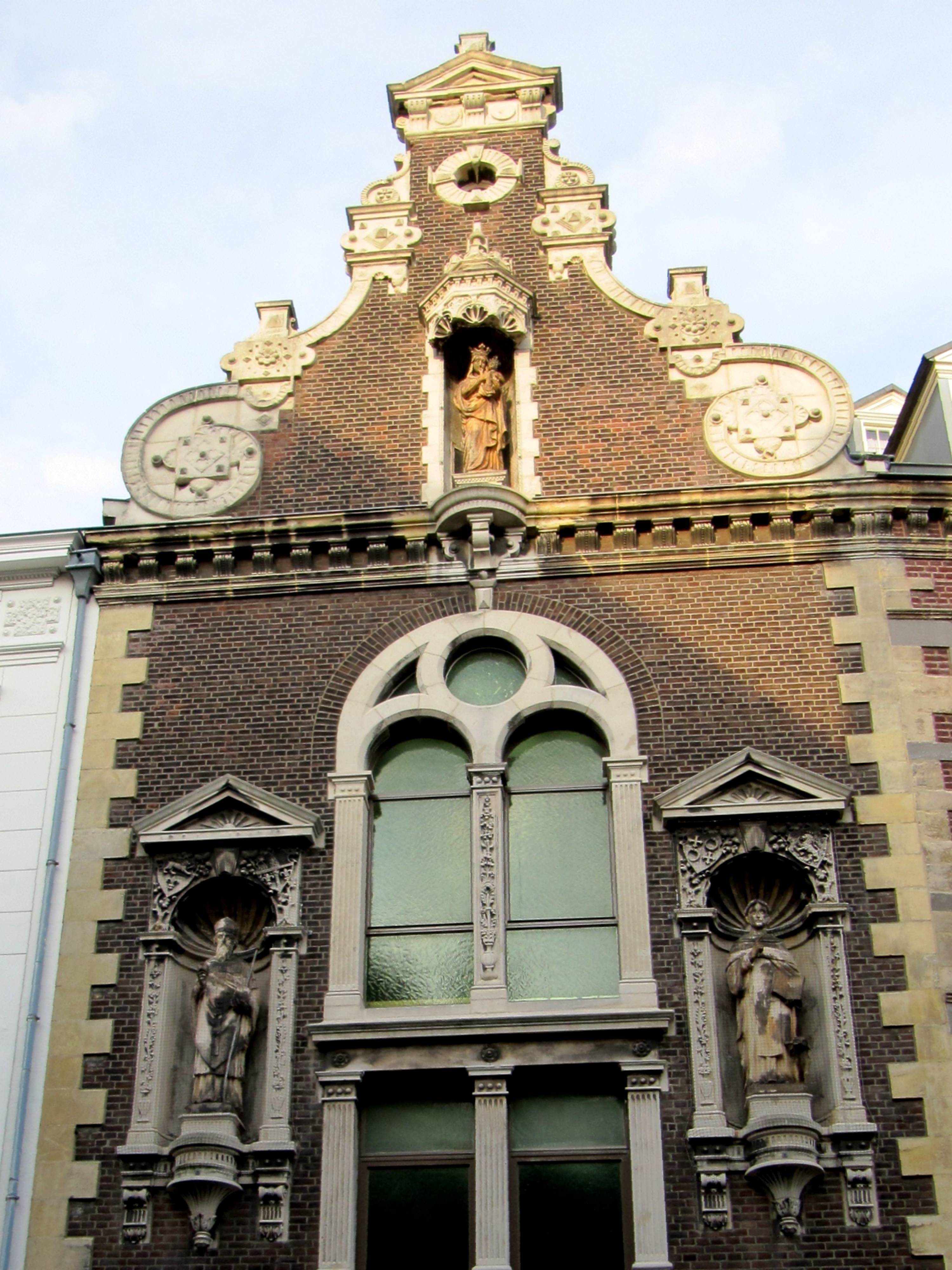 Roermond Neerstraat 33 Kloosterkapel, aangebouwd aan het Huis met de Steenen Trappen. Beelden van Maria, H. Augustinus en H. Dominicus